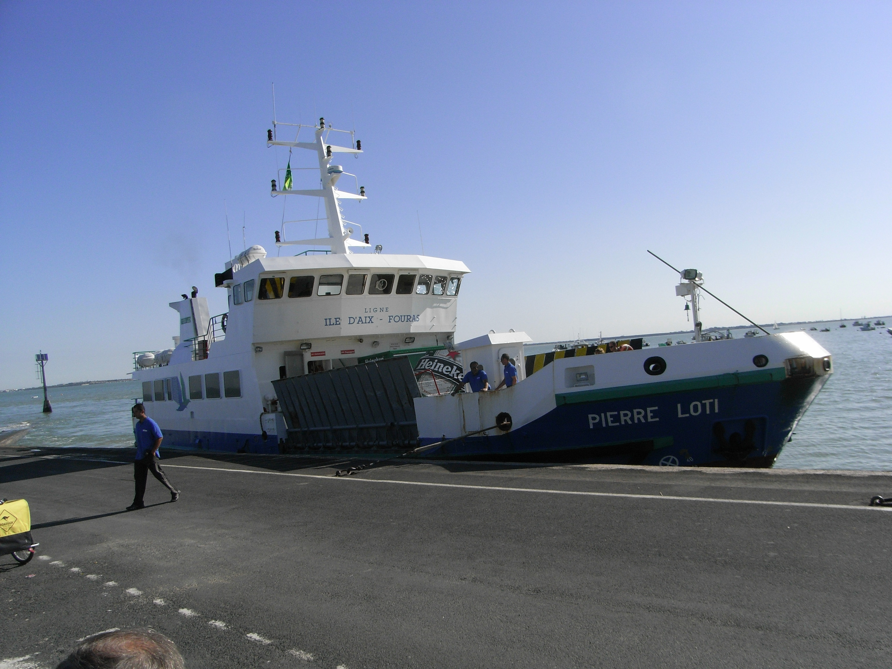 Bac le "Pierre Loti" assurant la liaison entre Fouras et l'Île d'Aix (Charente-Maritime).